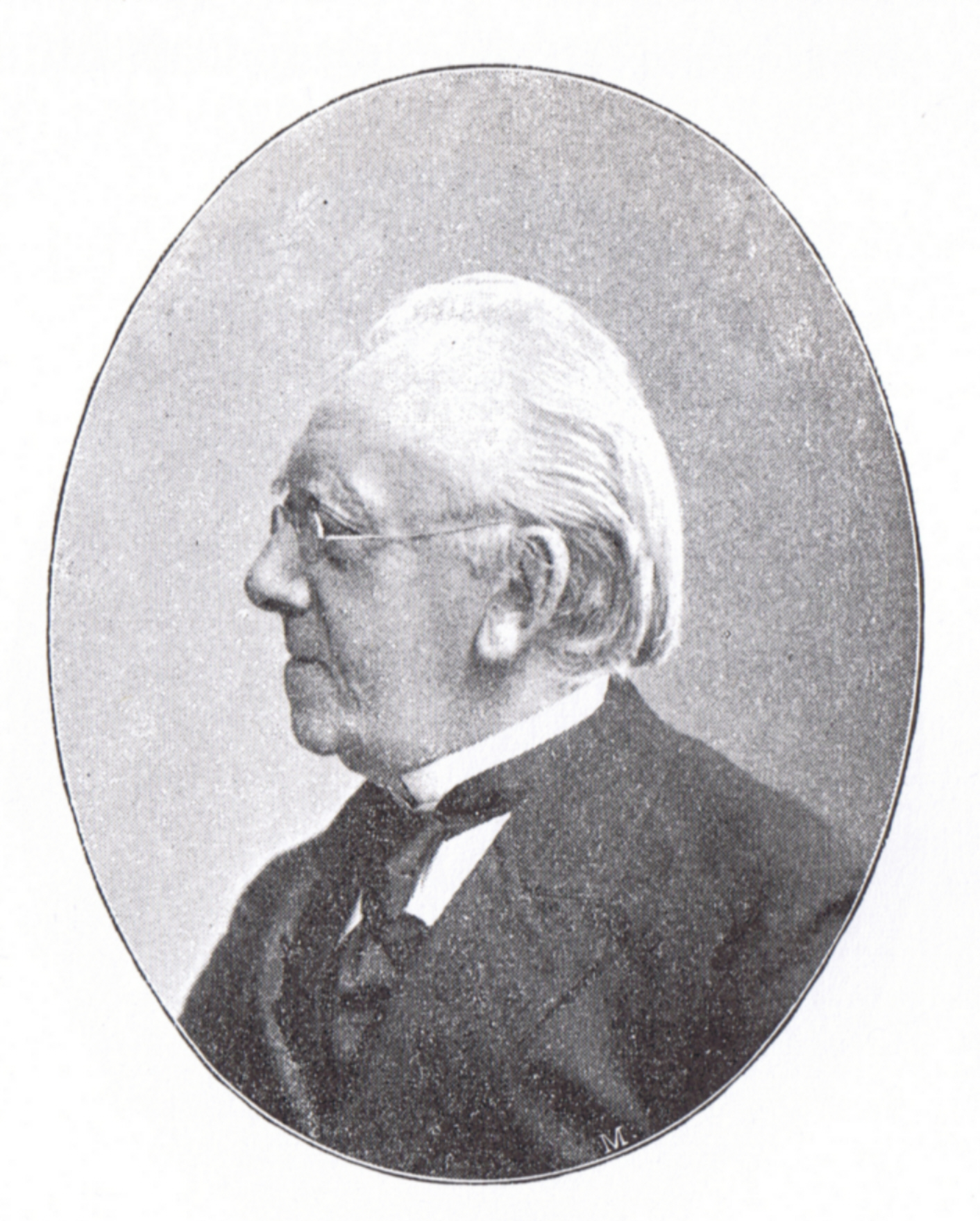 Rochus von Liliencron (1820-1912) deutscher Germanist und Musikhistoriker, der die deutsche Volksliedforschung begründete und als Herausgeber der monumentalen Allgemeinen Deutschen Biographie bekannt geworden ist.